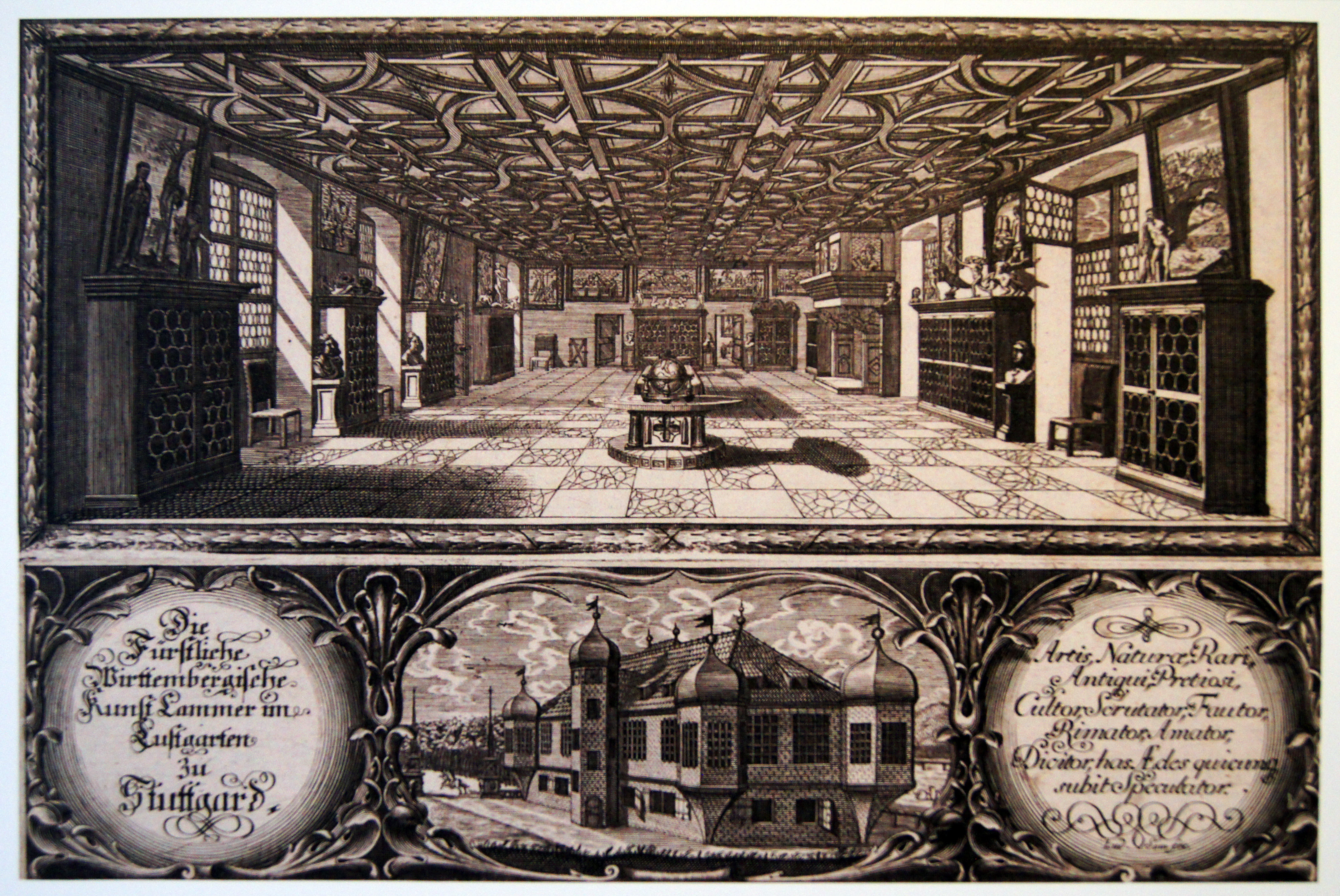 Die Fürstliche Wirttembergische Kunstkammer im Lustgarten zu Stuttgard, Reproduktion der _Radierung von I. Sommer, um 1670; Quelle: Kunstkammer im Landesmuseum Württemberg, Stuttgart